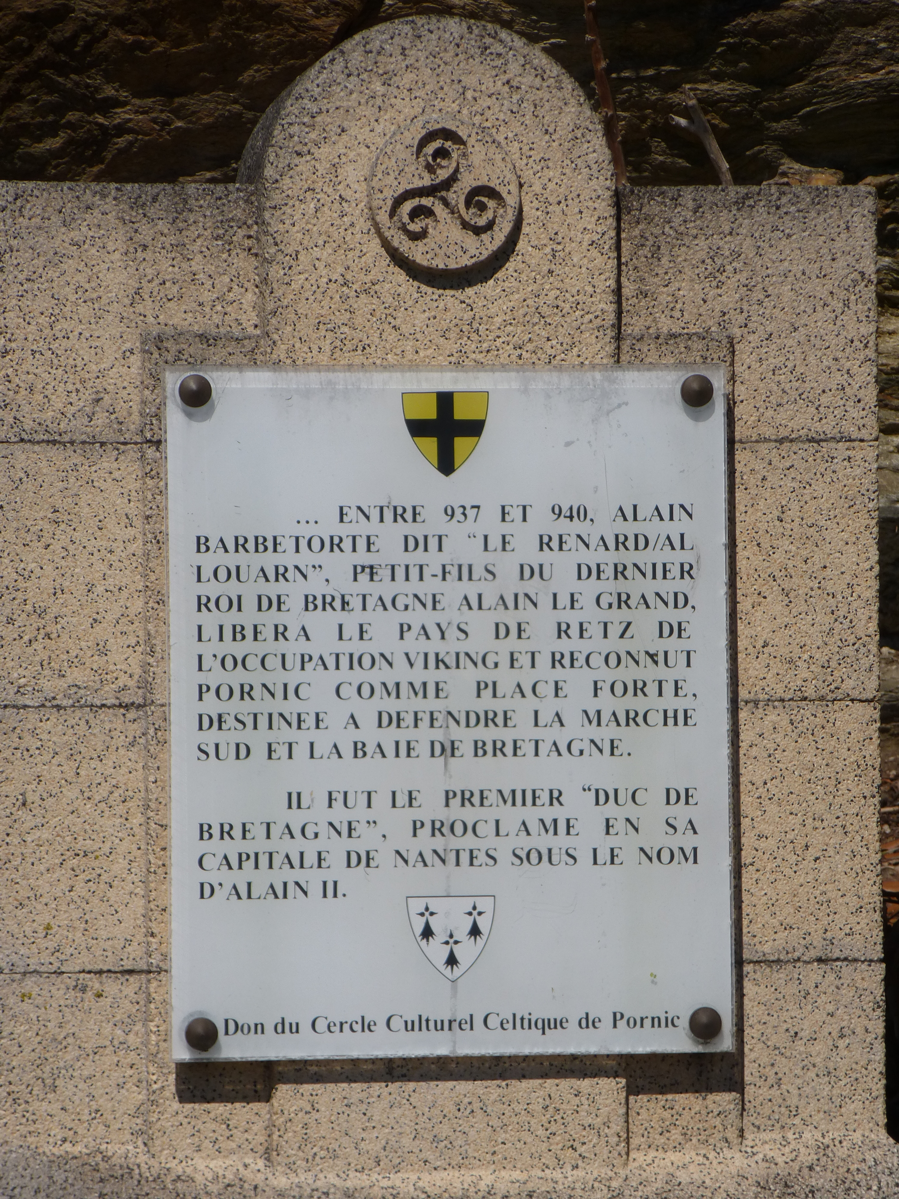 Alain II dit Le Renard, premier Duc de Bretagne, repousse les vikings en 940 - plaque commémorative à Pornic